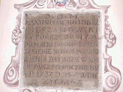 sarkofag rotmistrza Maximliana Cieszanowskiego, 1737, autor zdjęcia : Marek Silarski